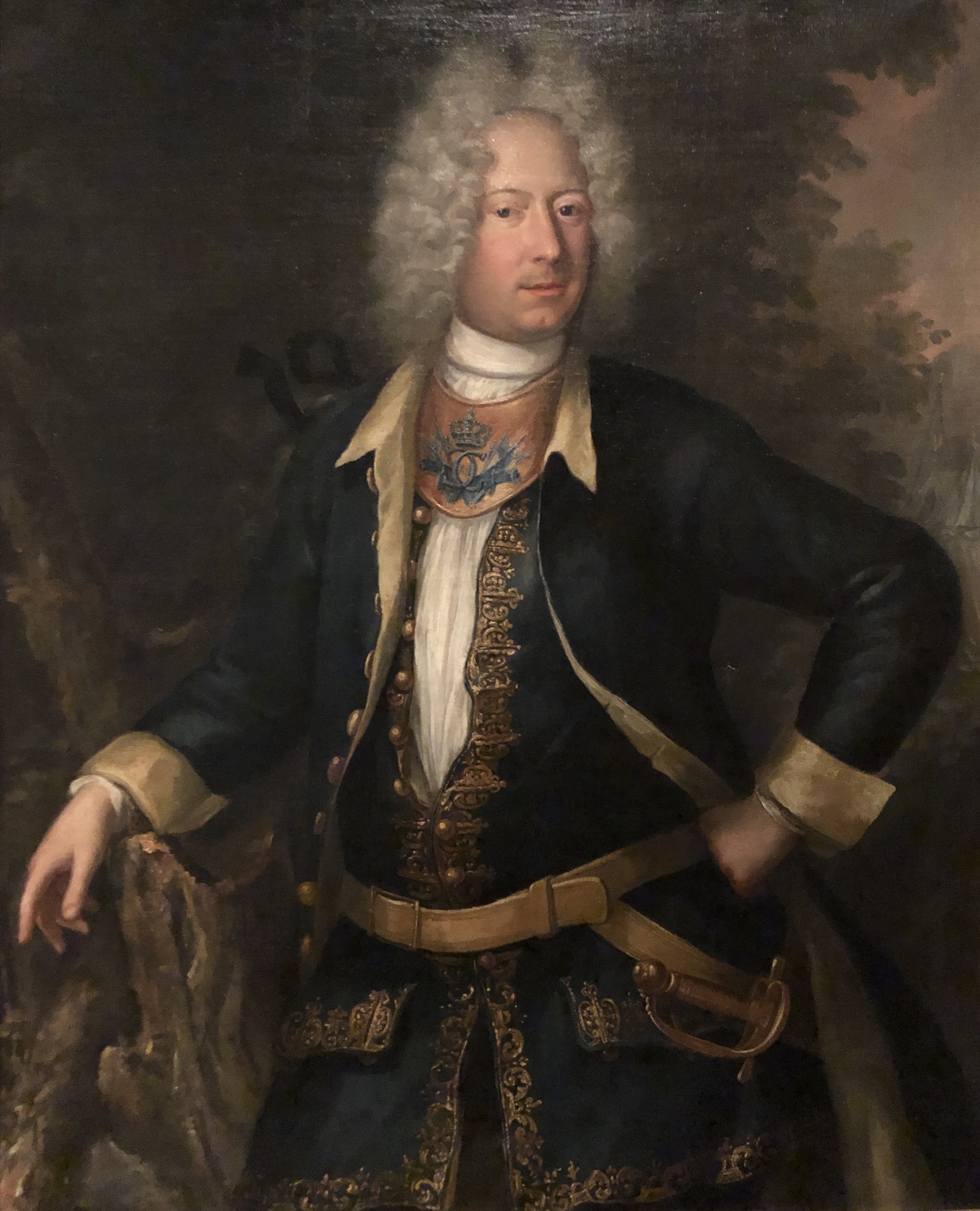 Arvid Horn avporträtterad i Drabantkårens uniform som dess kaptenlöjtnant. Porträttet från 1706 av Johan David Schwartz.